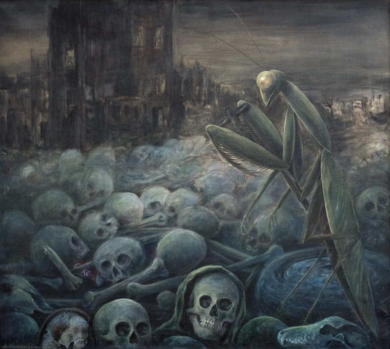 Titel: Die Frage der Gottesanbeterin